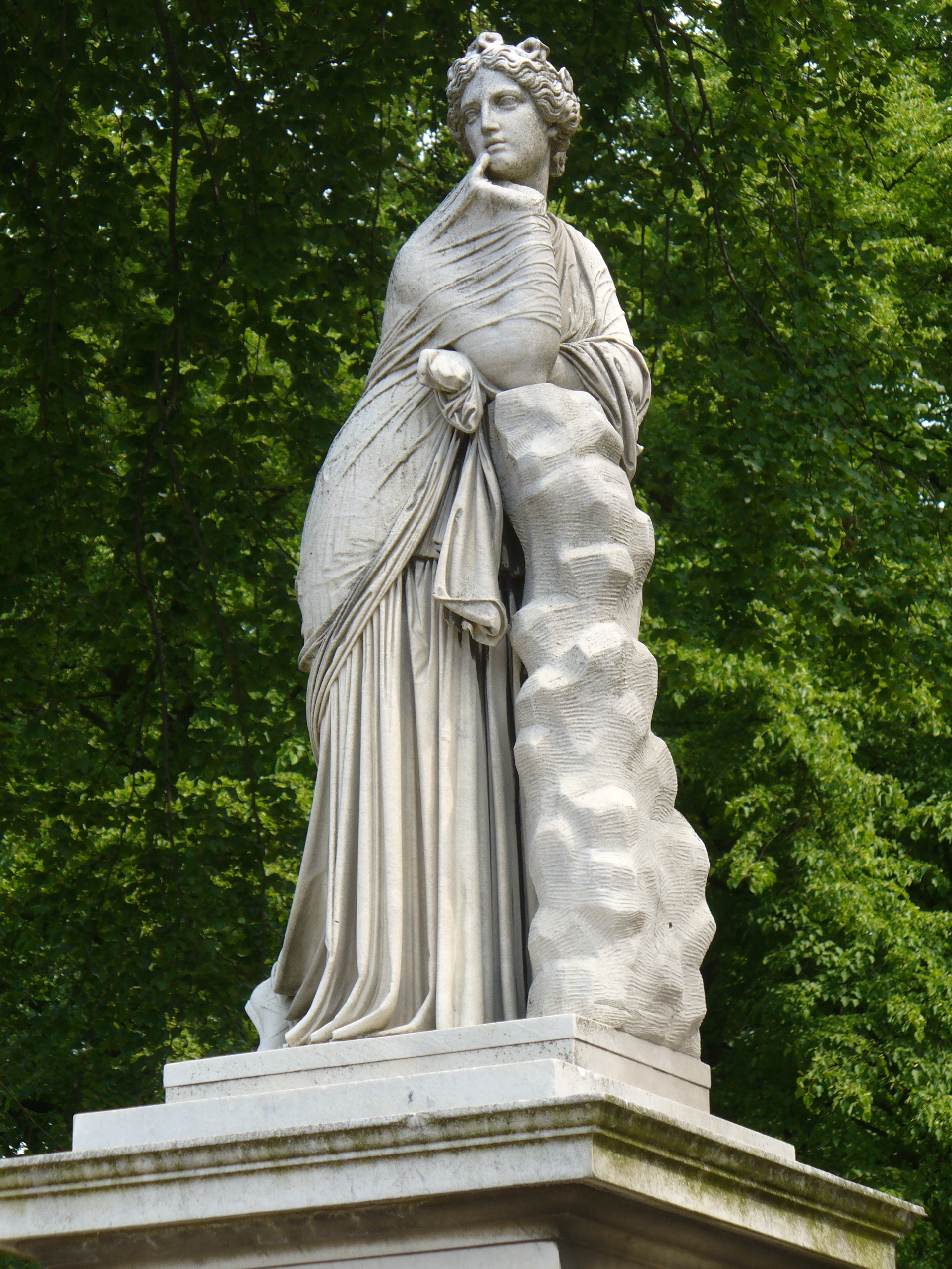 Brunnenwand mit Polyhymnia(Muse der Hymnendichtung)-Friedrich Ochs(1857)- Sanssouci